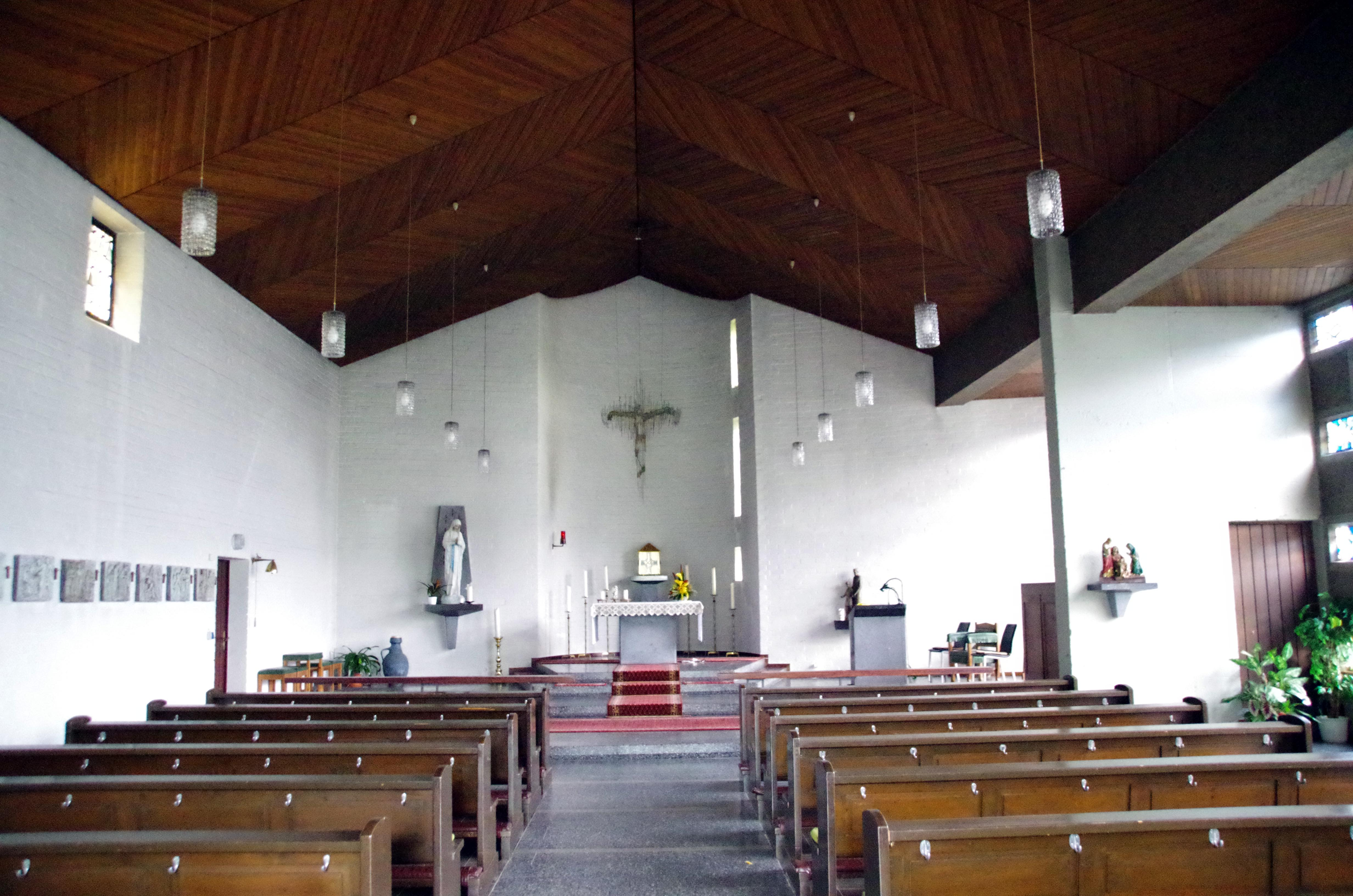 St. Josef (Oberhausen), Innenraum